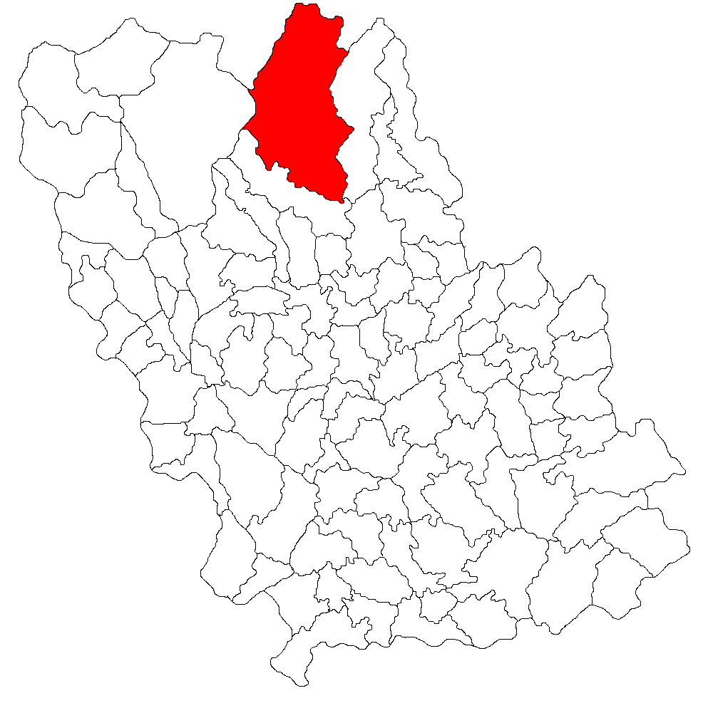 Categorie:Hărţi ale judeţului Prahova